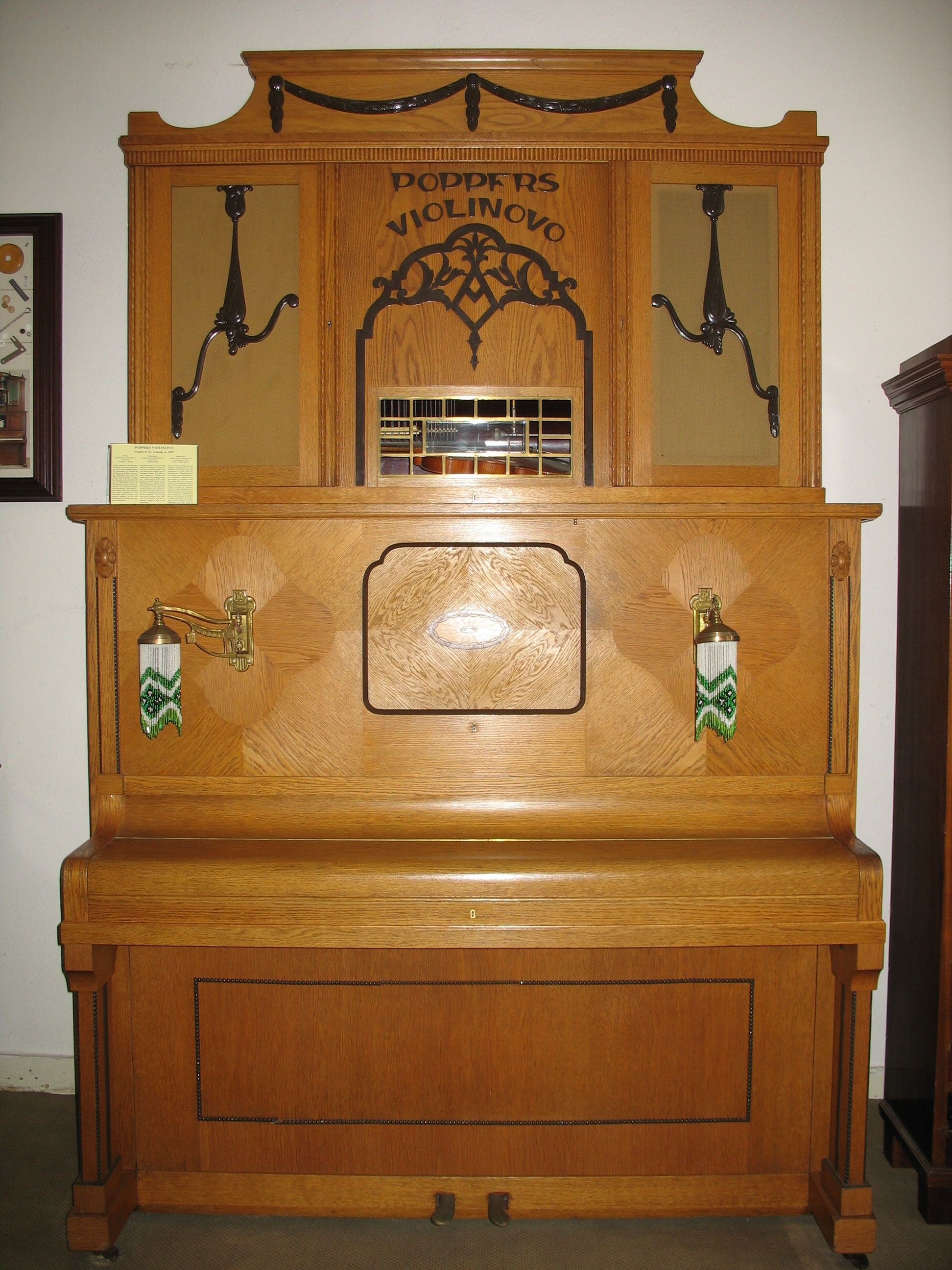 Instrument in Siegfried's Mechanischem Musikkabinett Popper's Violinovo by: Popper & Company, Leipzig, Germany